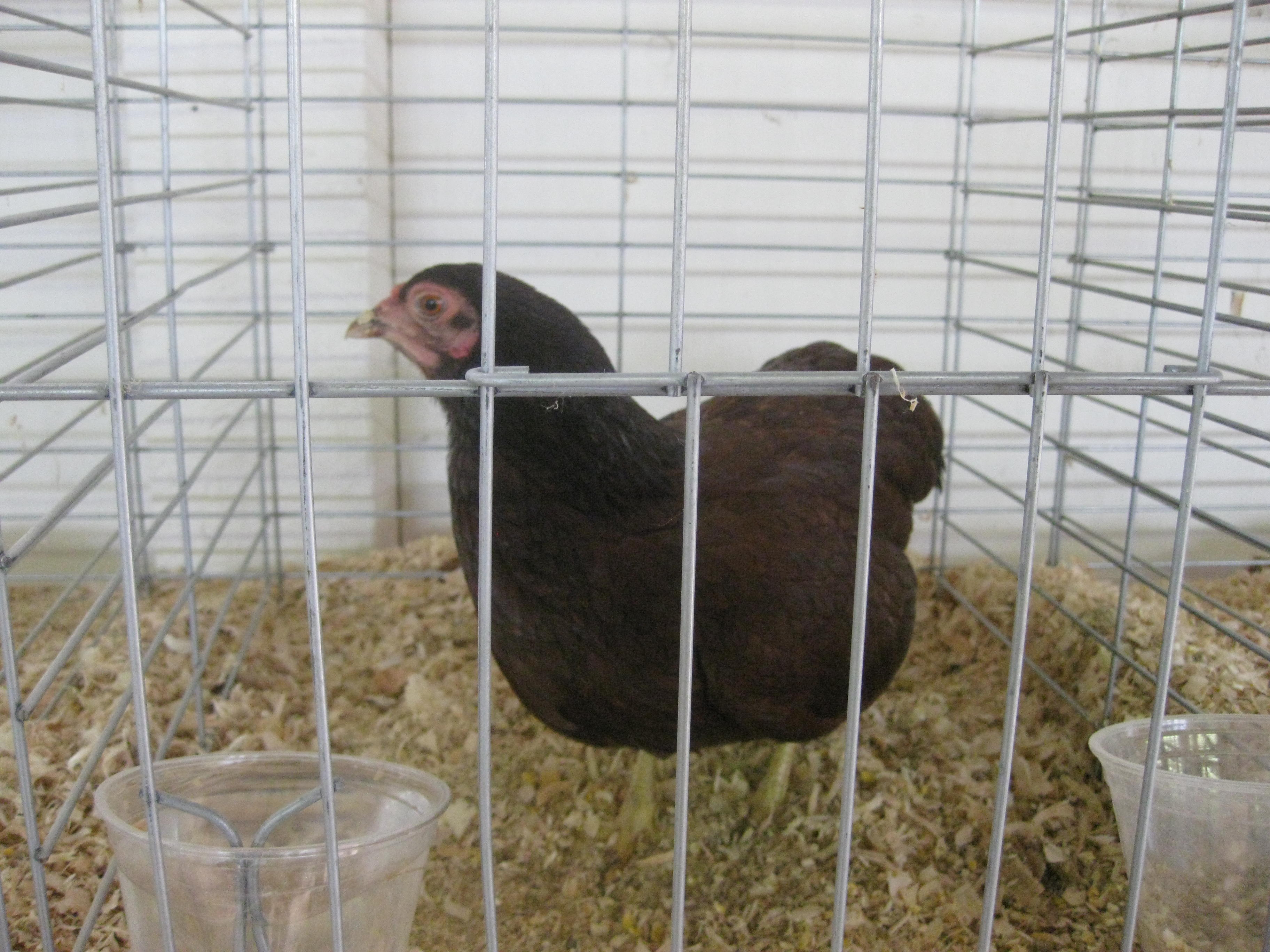 A bantam Buckeye hen.